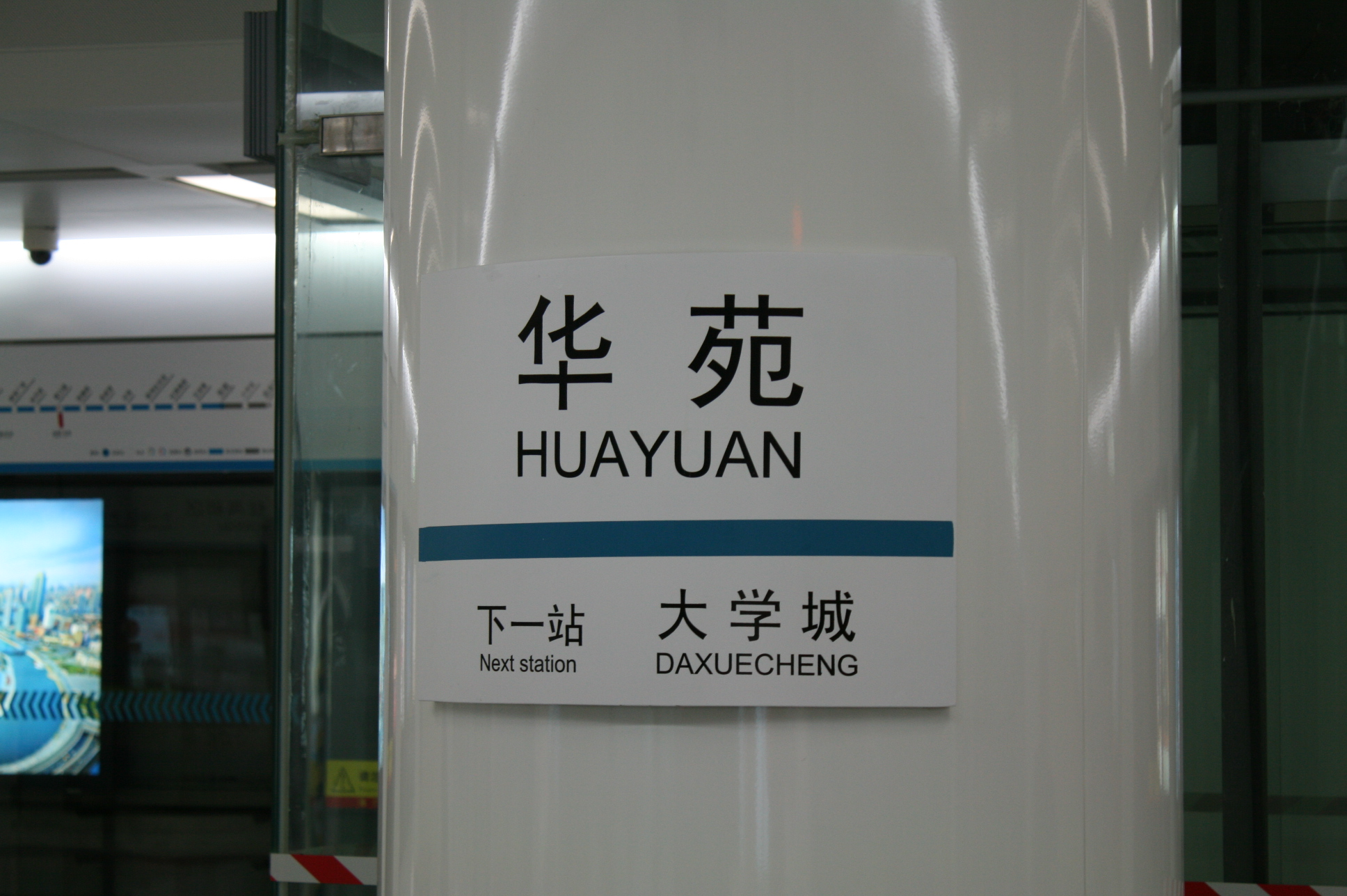 天津地鐵三號線華苑站站牌